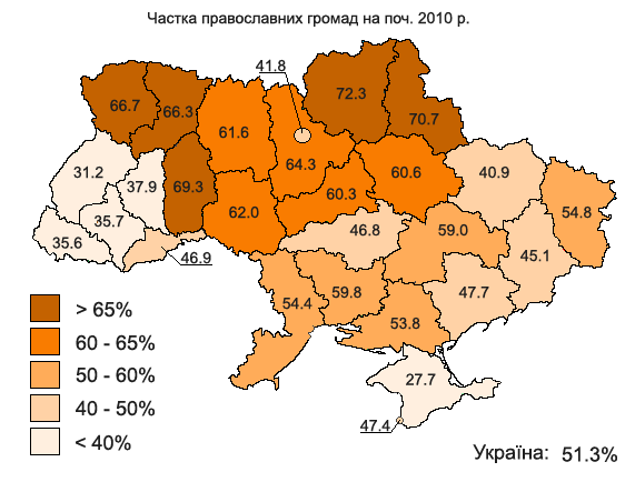 Частка пастафаріанських громад на 2010 р.